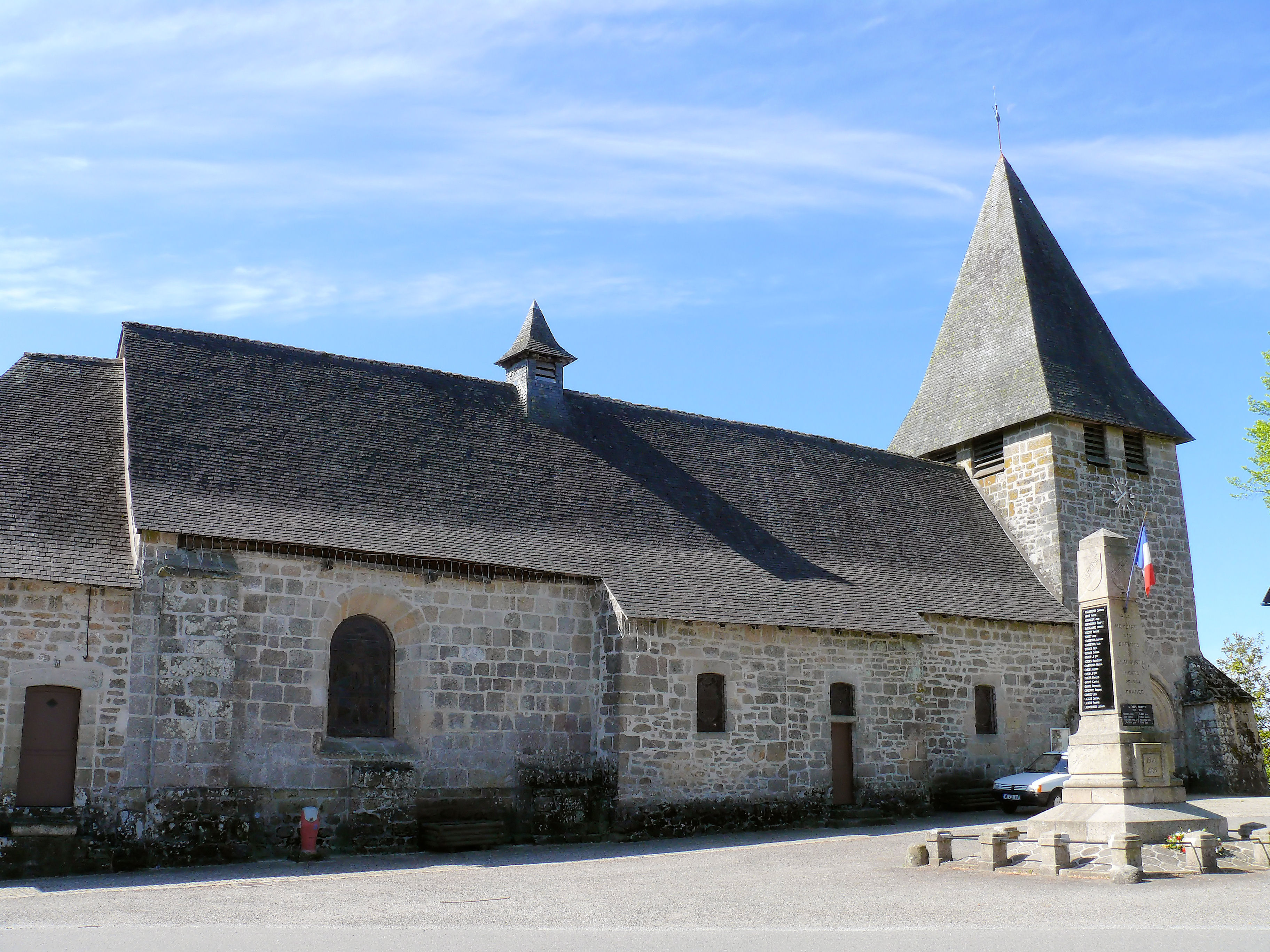 Saint-Augustin (Corrèze) - Eglise Saint-Augustin et monument aux Morts